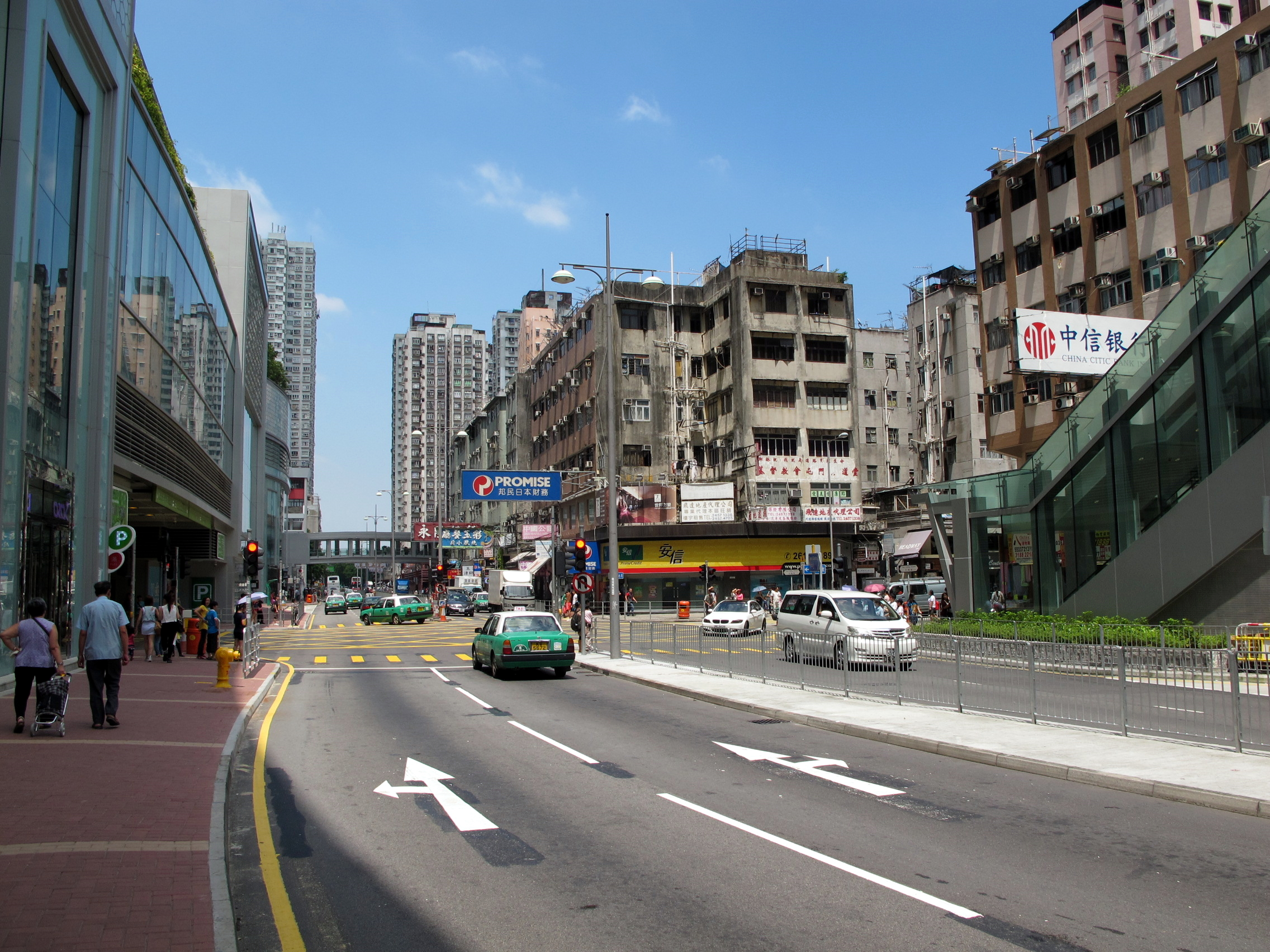 Tuen Mun San Hui